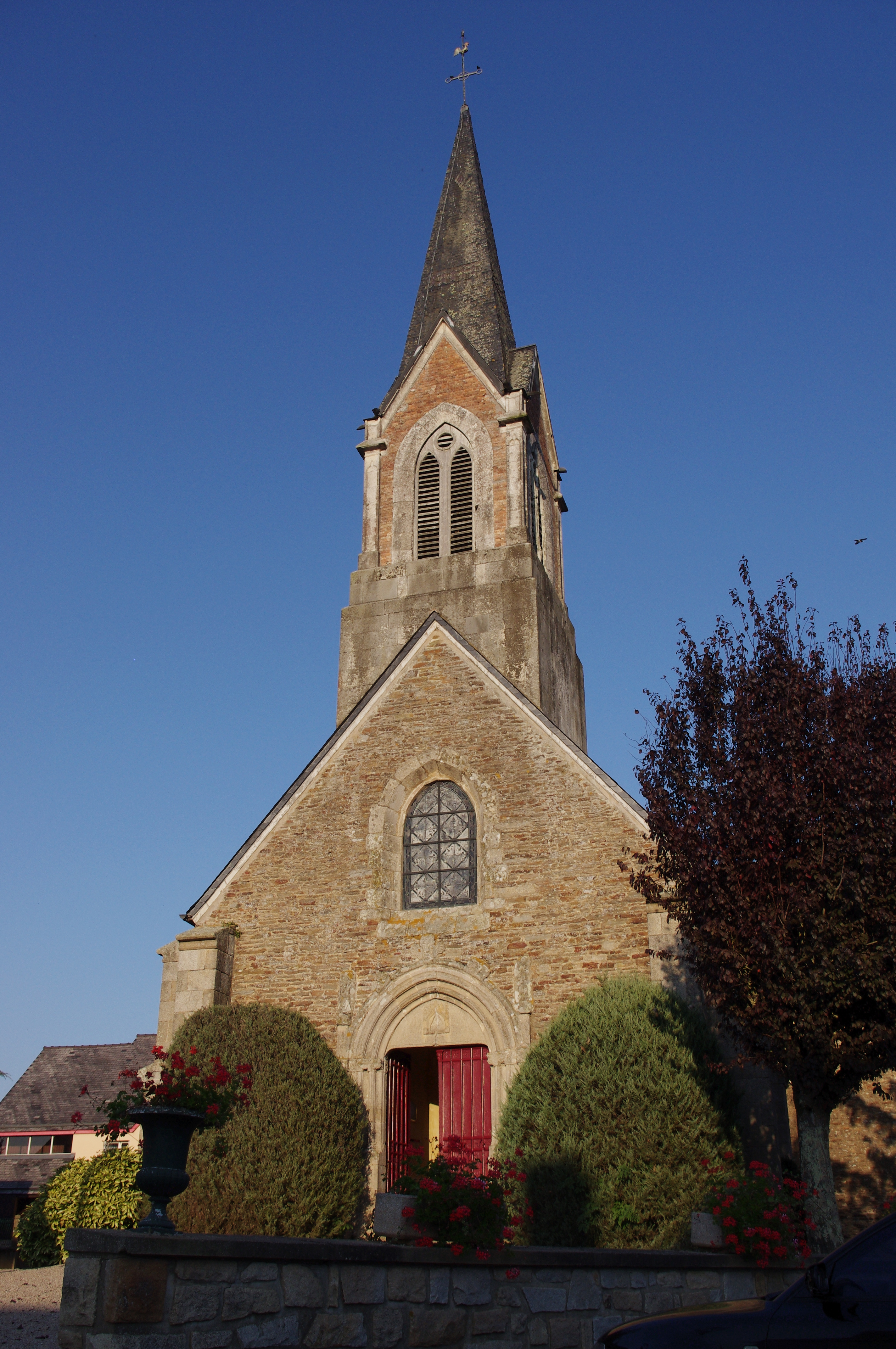 Eglise, St Uniac